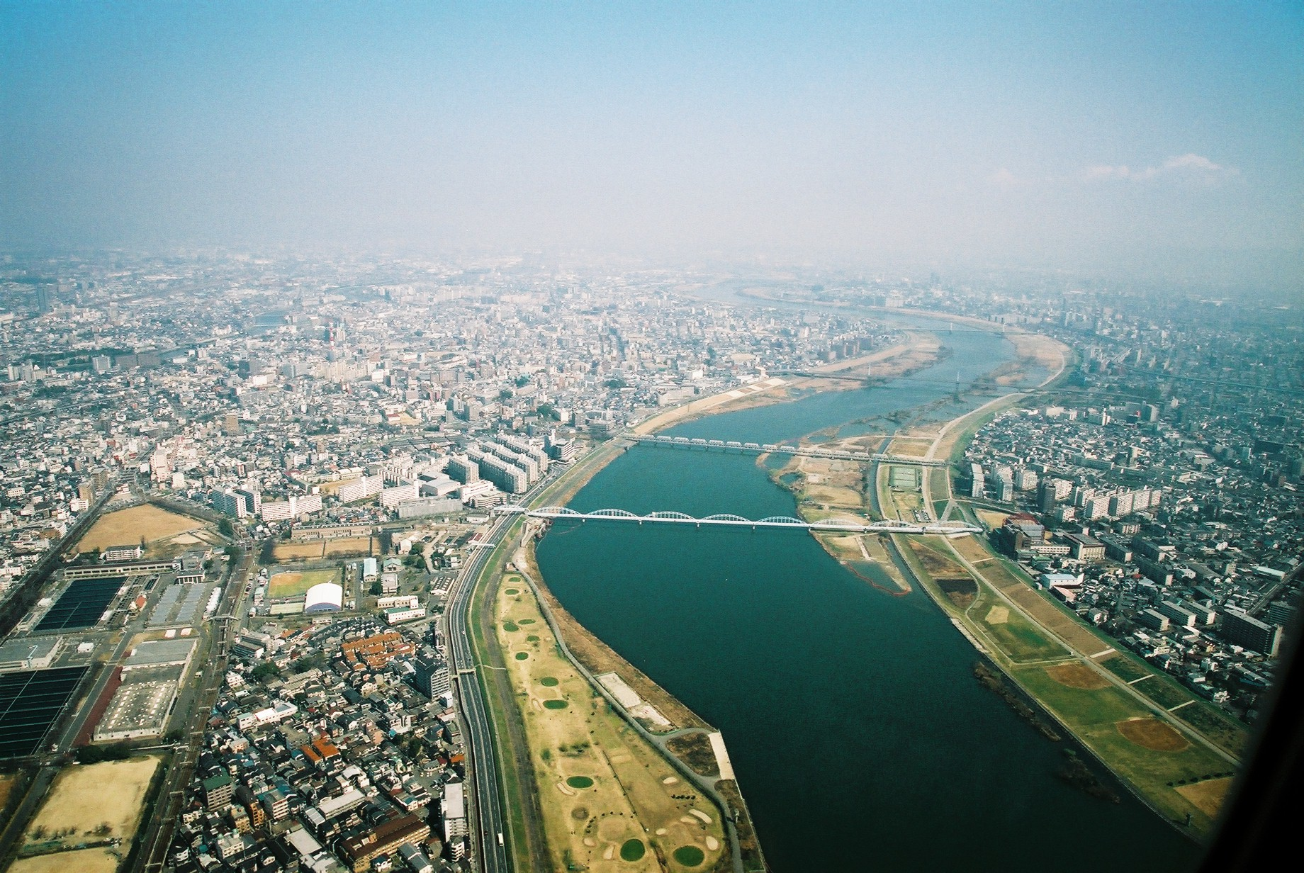 淀川